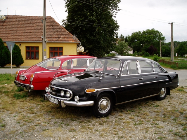 Tatra 2-603, Modell ´69 (last modifiation), (1969), Photo: Ondrej Ertl (2005)